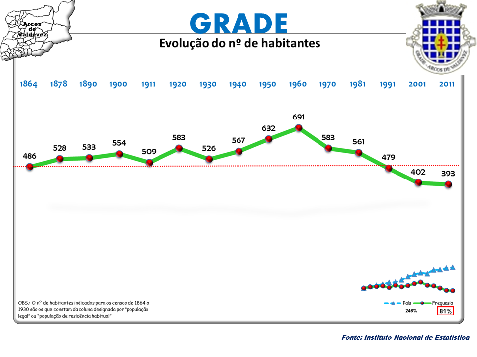 Censos 1864/2011